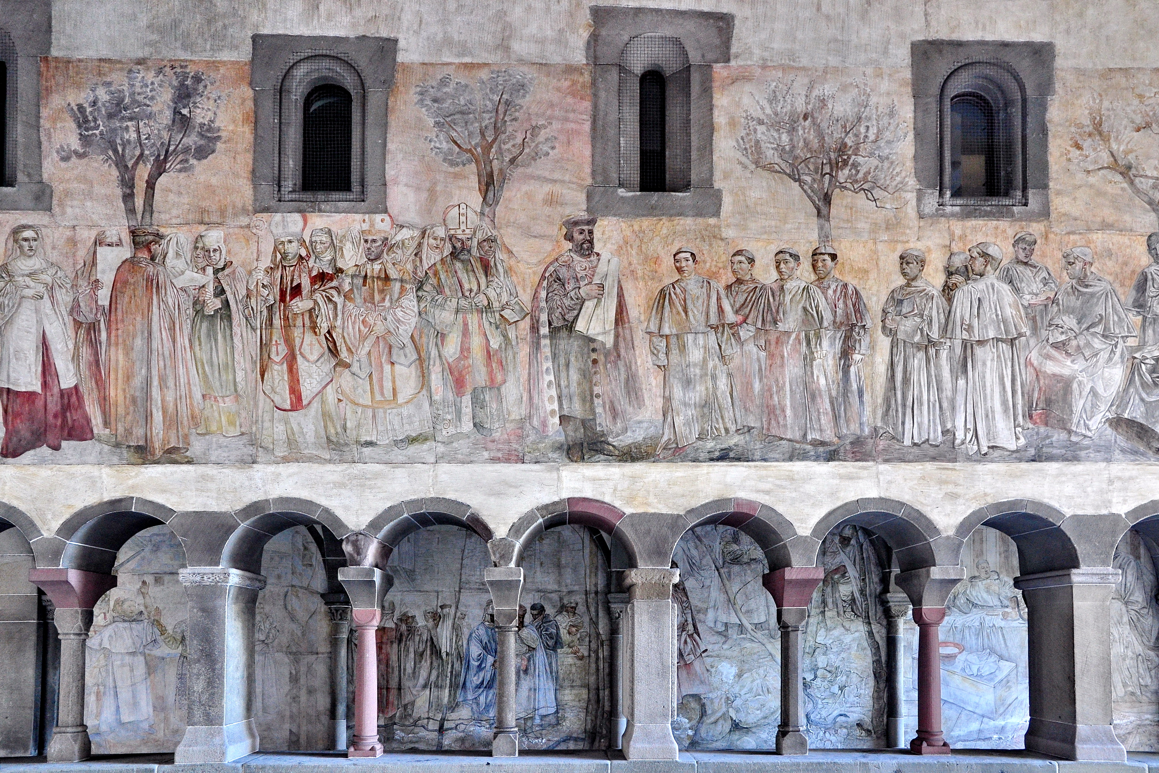 Paul Bodmers Wandmalereien im Kreuzgang des Fraumünsters in Zürich (Schweiz)